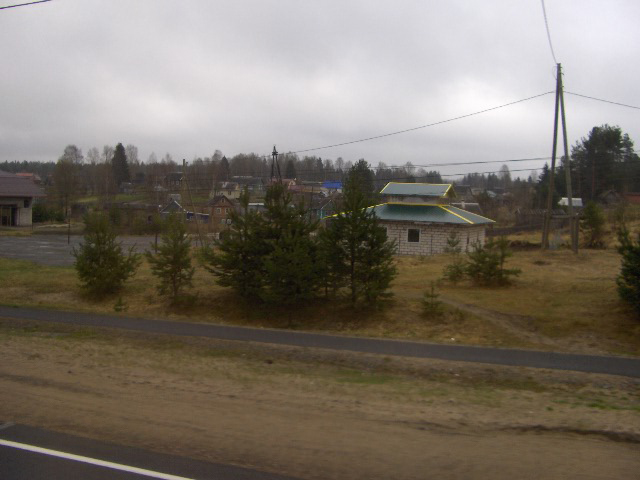 Matroosan kylää linja-auton ikkunasta kuvattuna